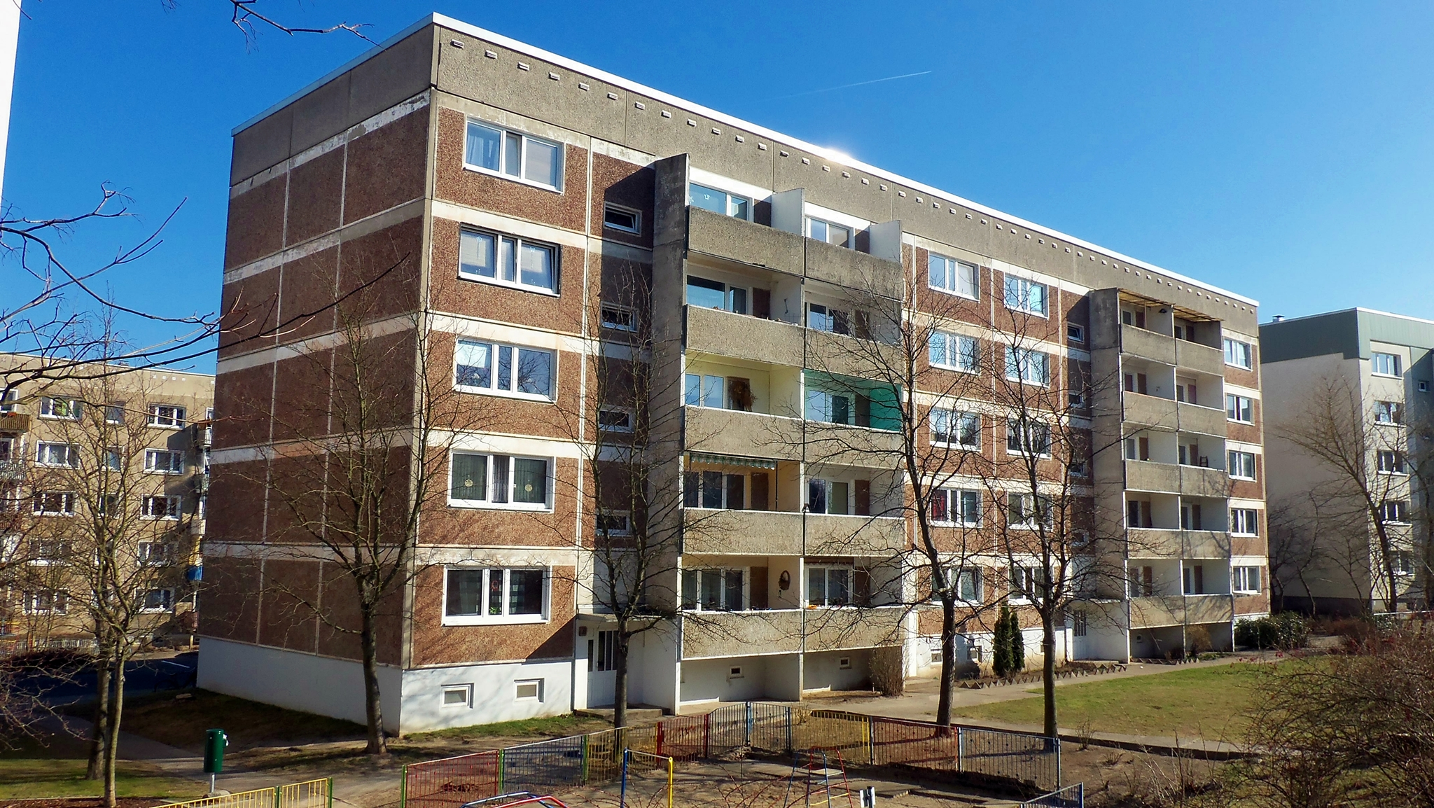 Weiterer WBS 70 Block der ersten Generation in Neubrandenburg, erbaut 1973, Petrosawodsker Straße